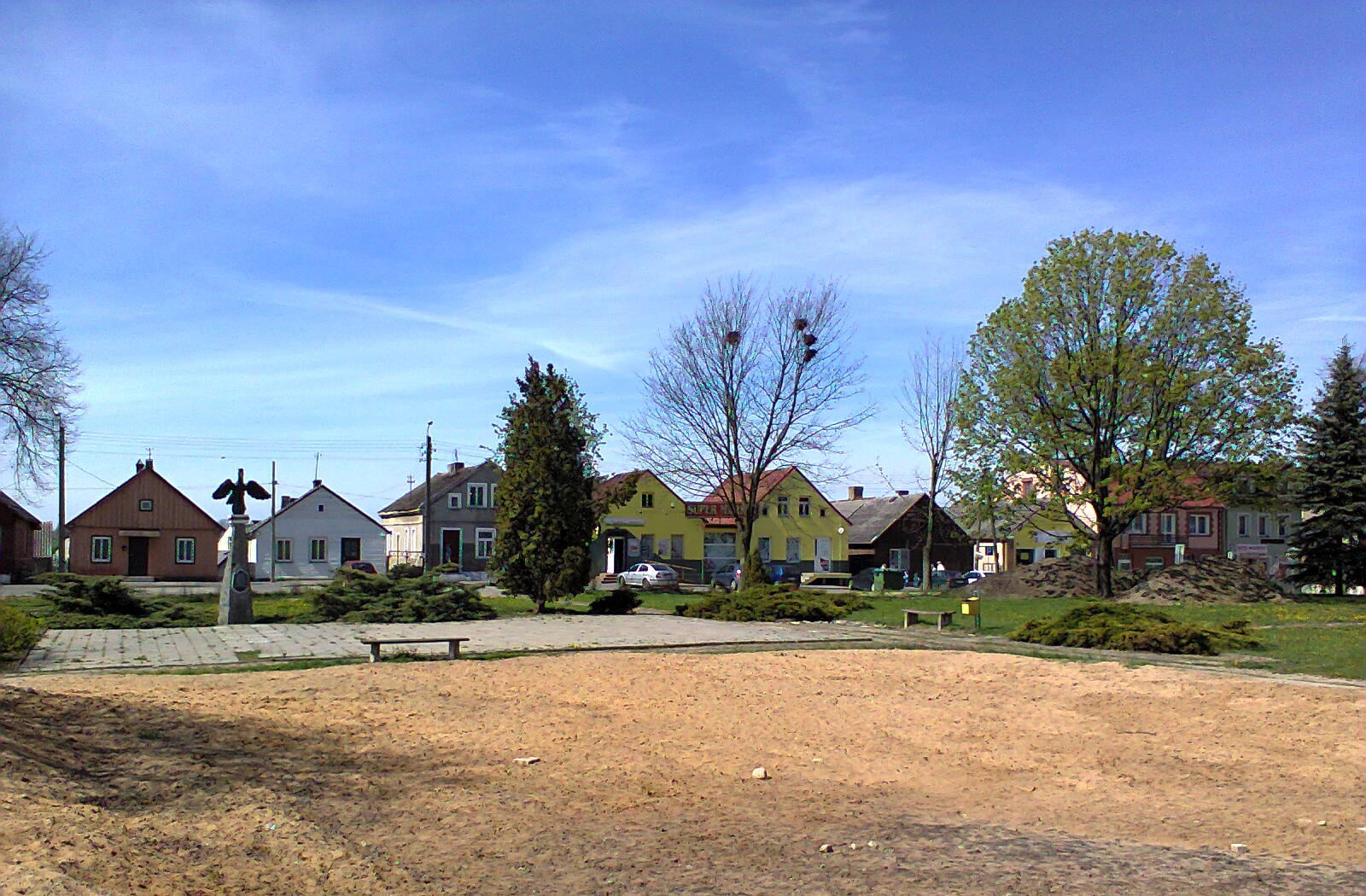 Radziłów